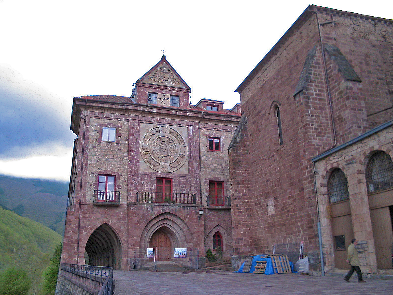 Monasterio de Valvanera, por fuera, en La Rioja (España).